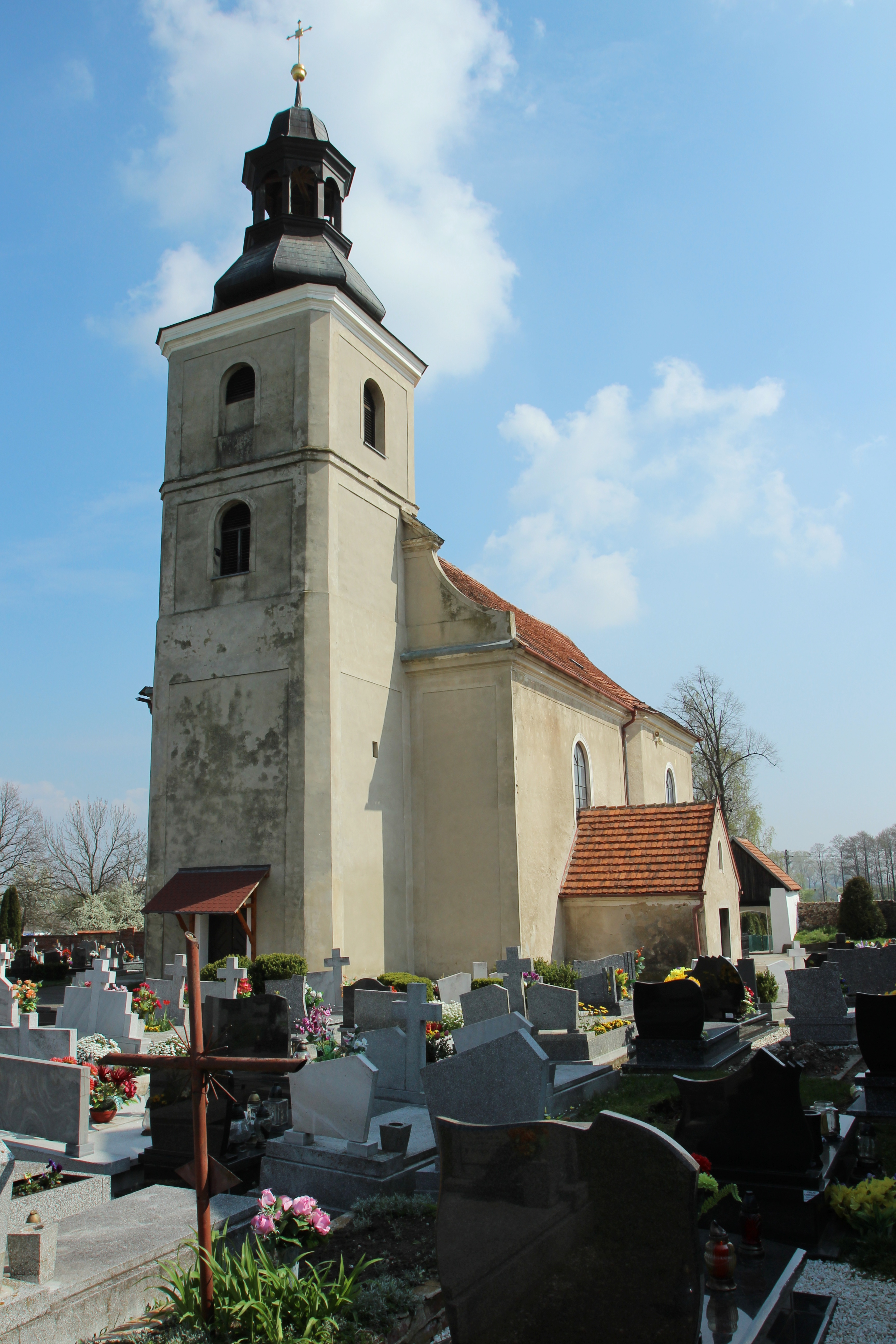 Włodary – rzymskokatolicki kościół parafialny p.w. Narodzenia NMP, 1749-54.